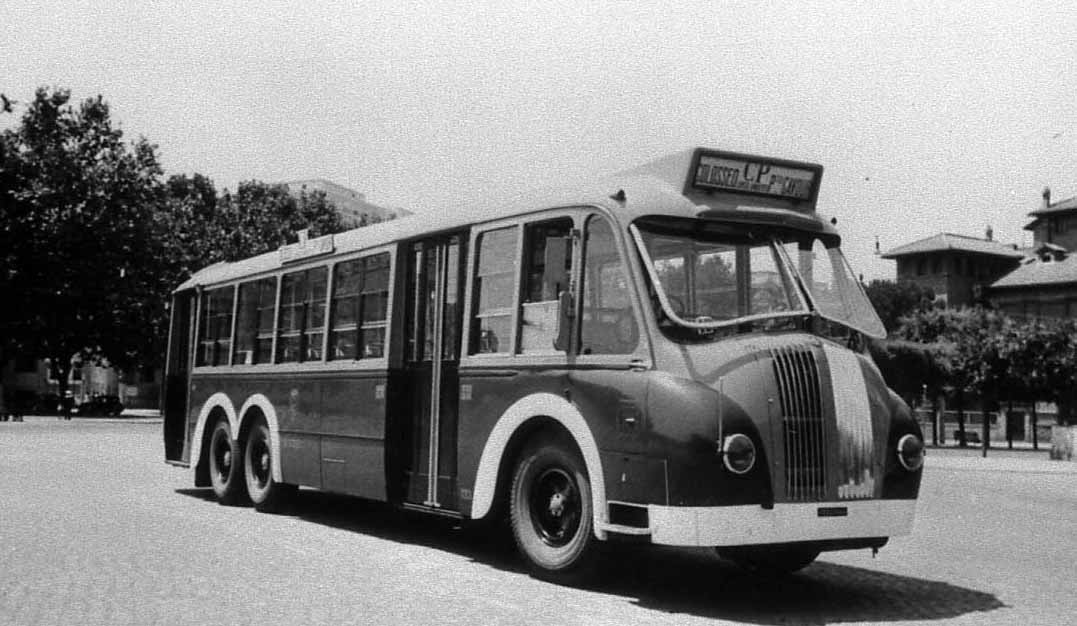 Autobus Alfa Romeo 110A di Roma ex gasogeno